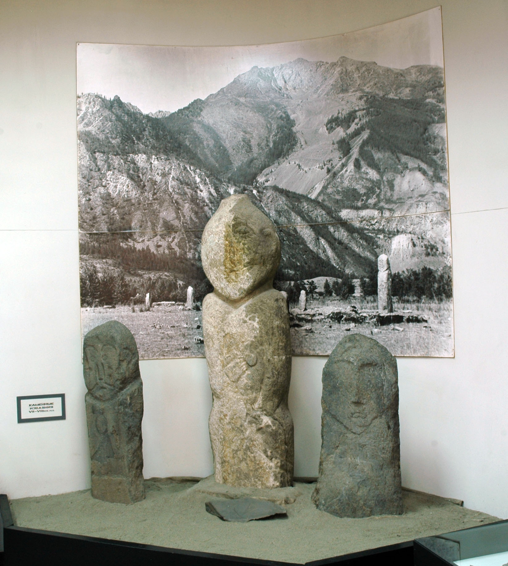 Часть экспозиции Музея археологии и этнографии Алтая